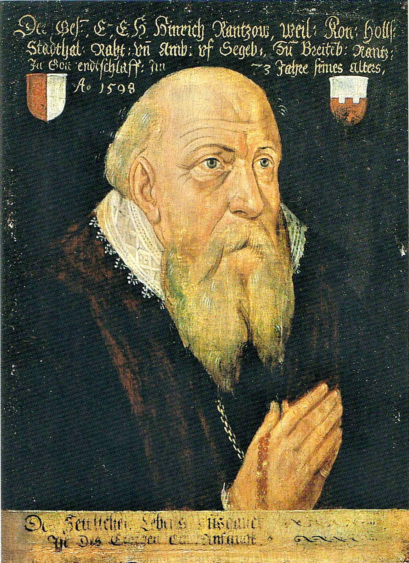 Porträt des alten Heinrich Rantzau